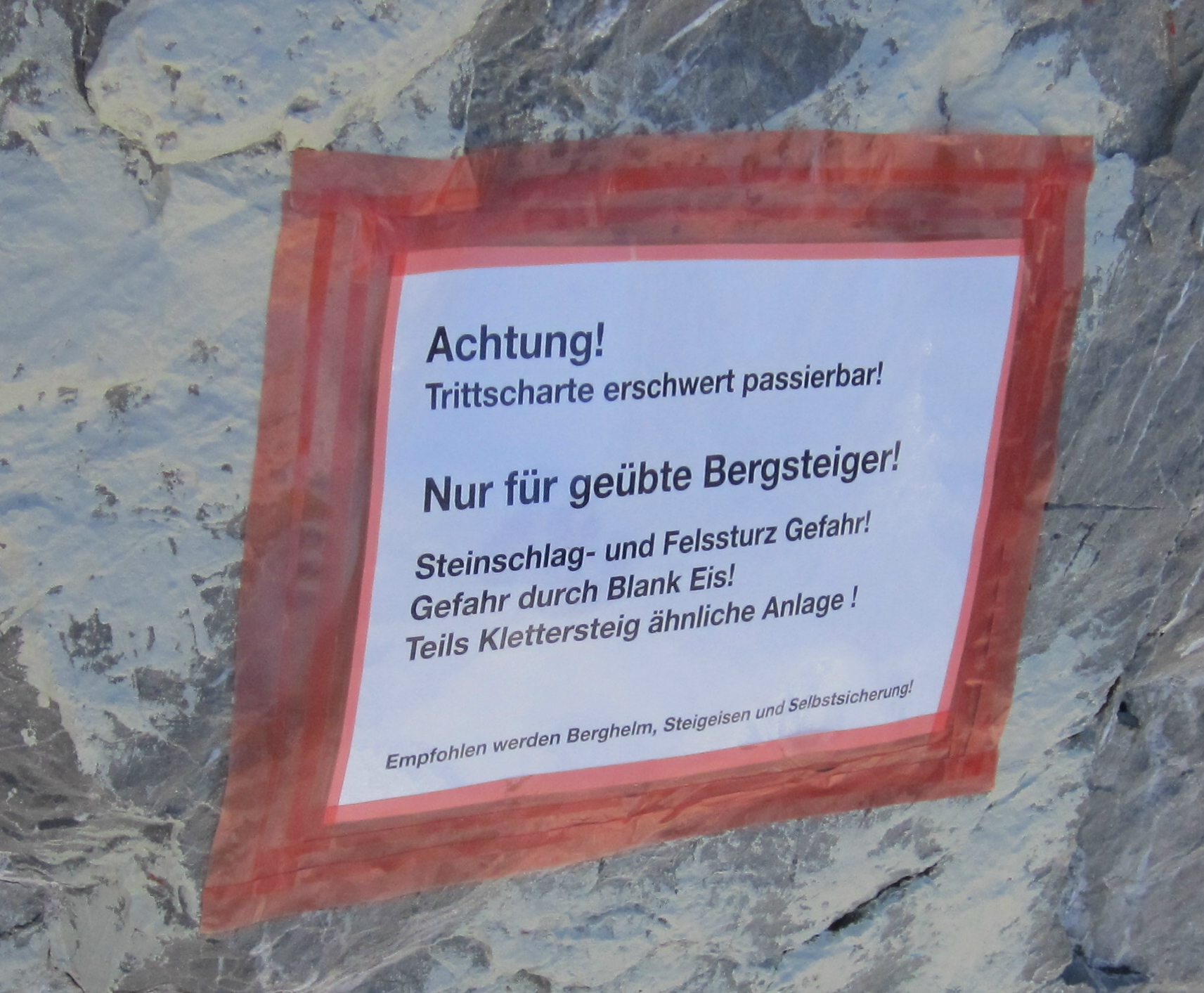 Warnhinweis zm Passieren der Trittscharte. Robert-Bosch-Weg, Lechtaler Alpen.